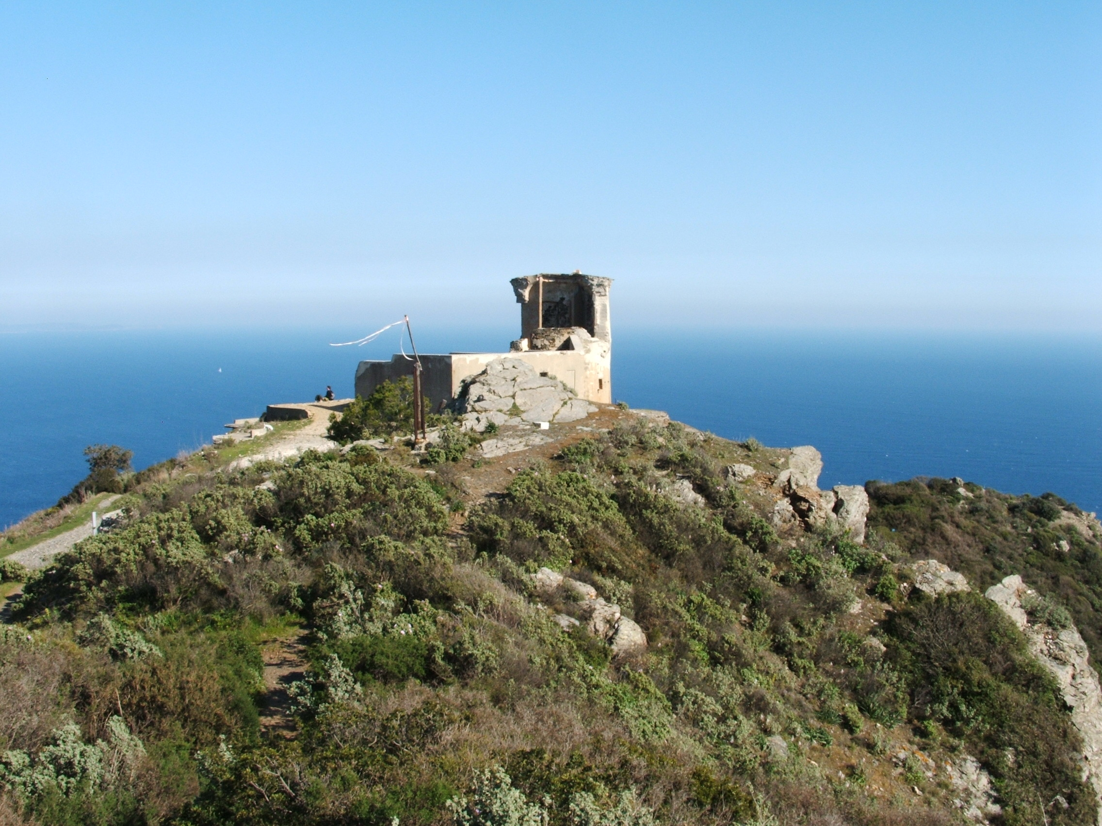 Le sémaphore du Cap Sicié - Six-Fours-Les plages- Avril 2008